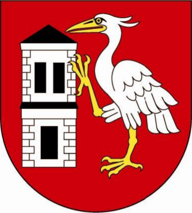 Herb gminy Borki